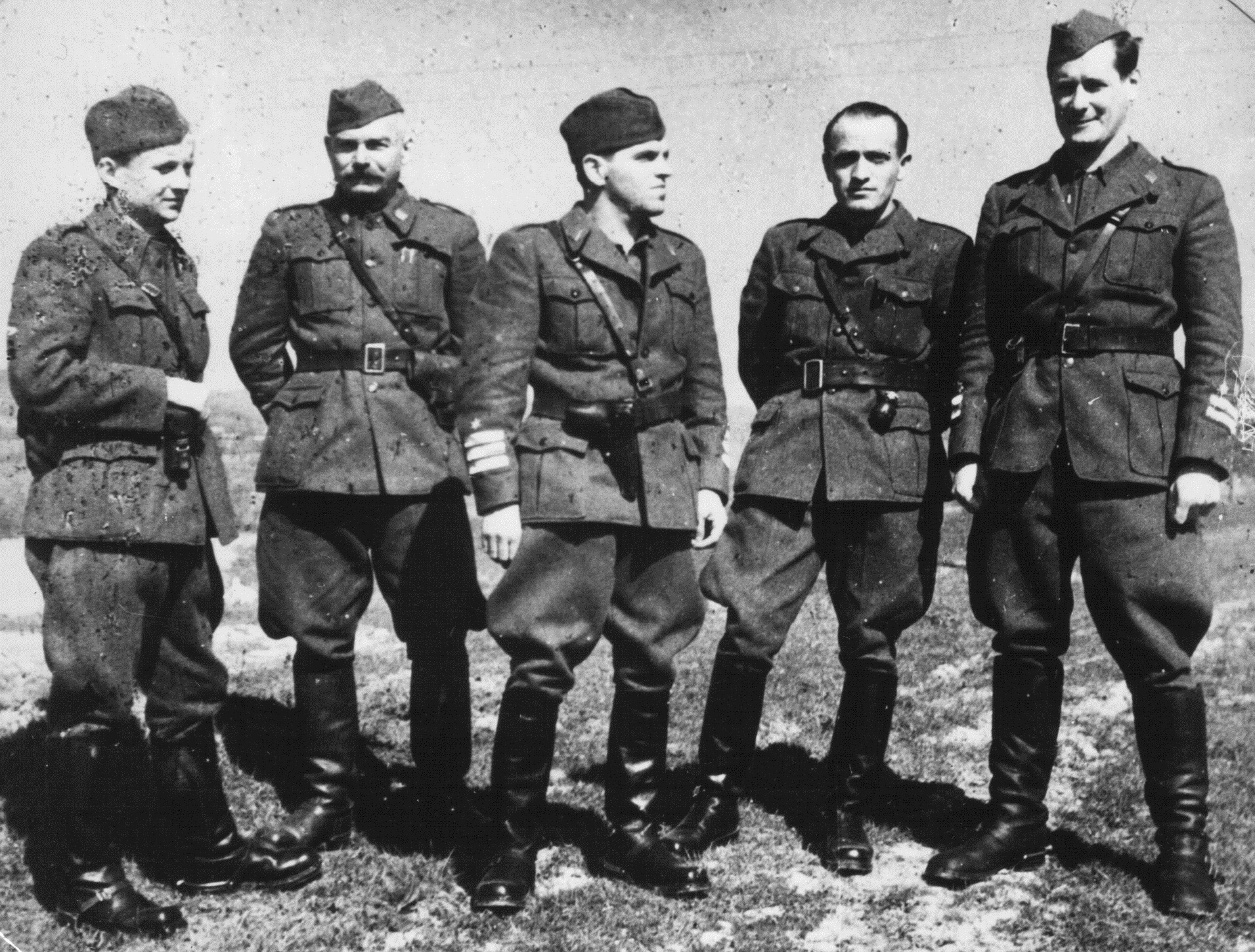 Člani Glavnega štaba Narodnoosvobodilne vojske in partizanskih odredov Slovenije. Od leve; Boris Kraigher, Jaka Avšič, Franc Rozman, Viktor Avbelj in Dušan Kveder.